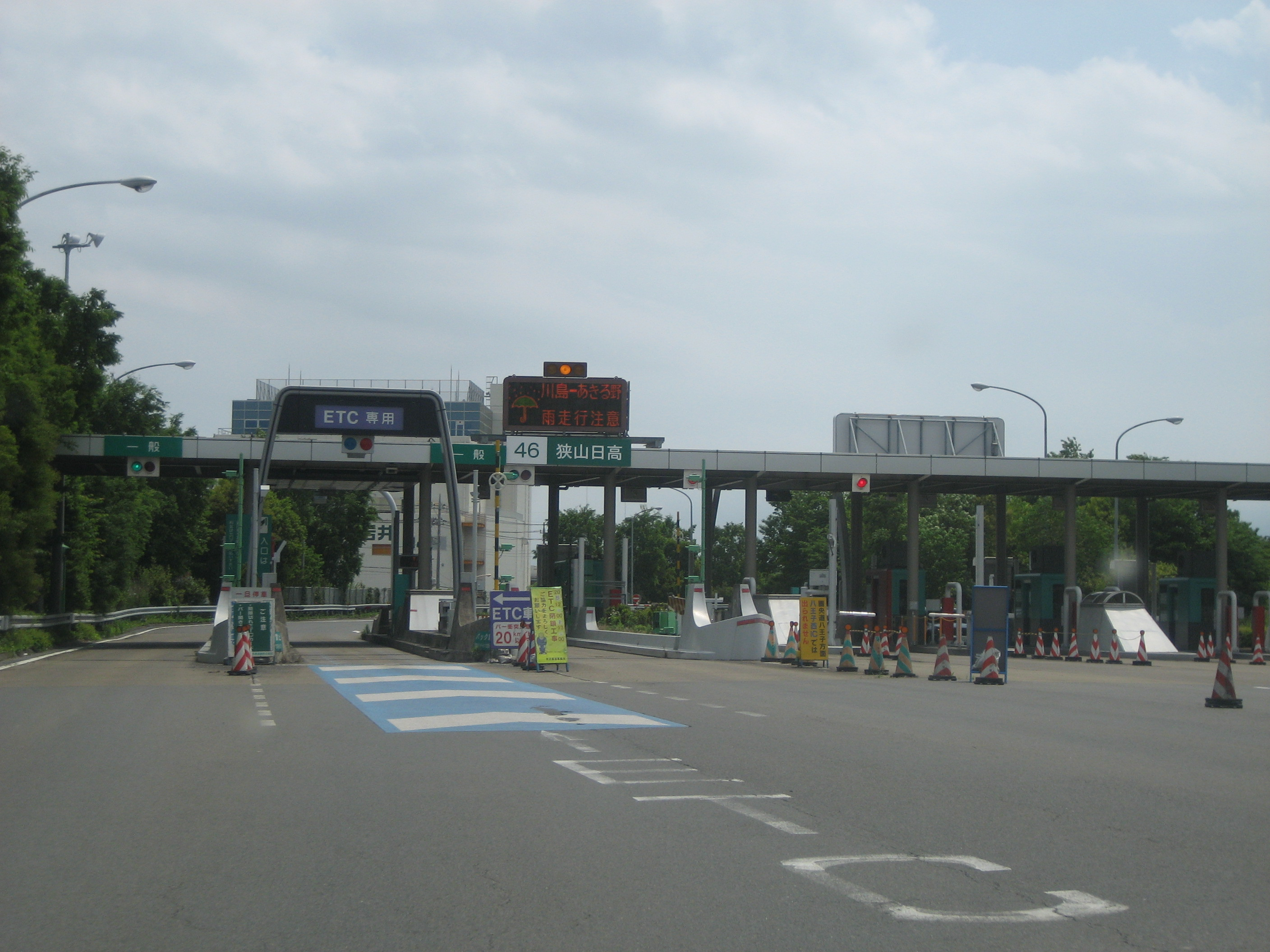 首都圏中央連絡自動車道狭山日高IC料金所